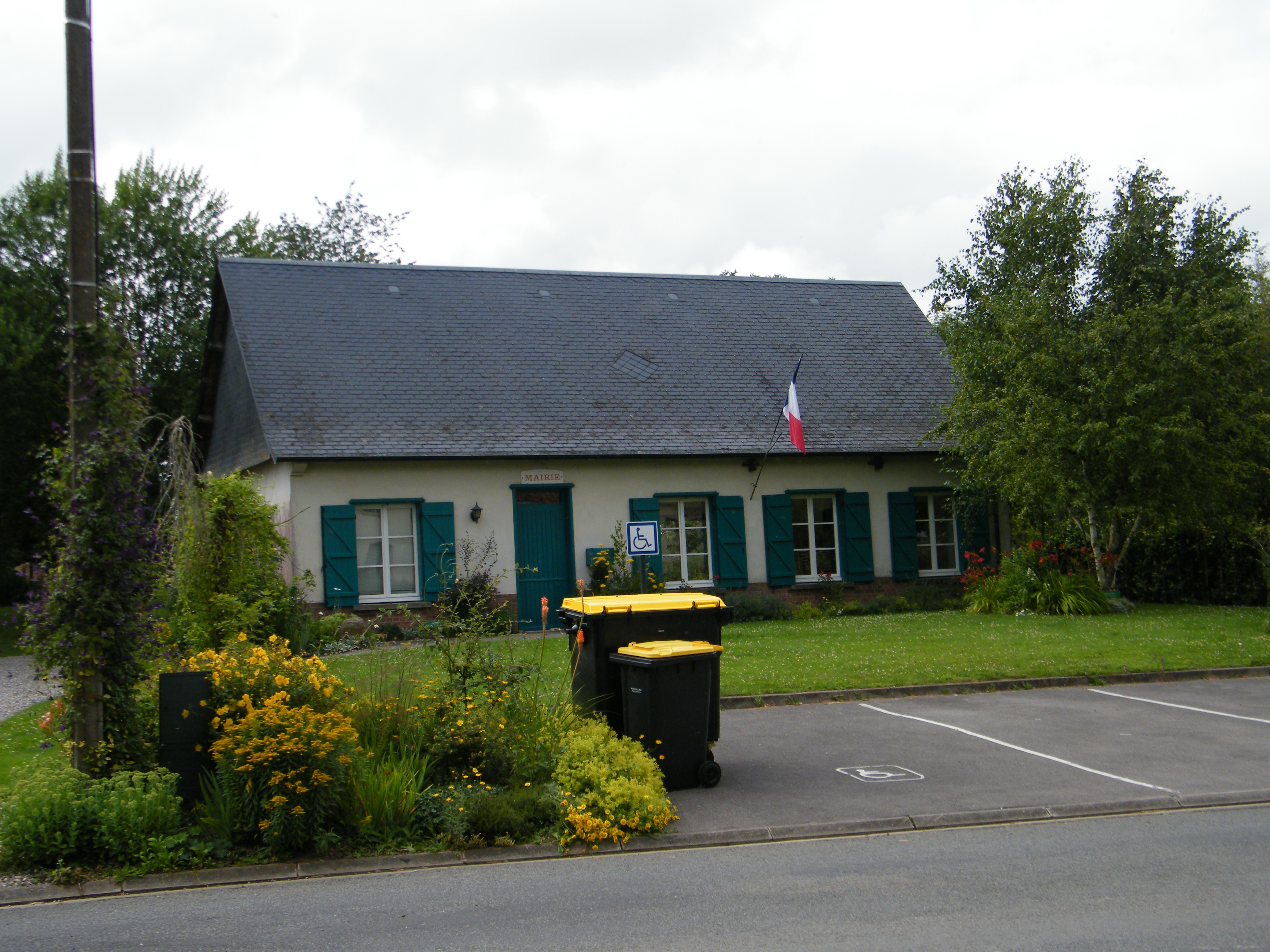 Mairie.